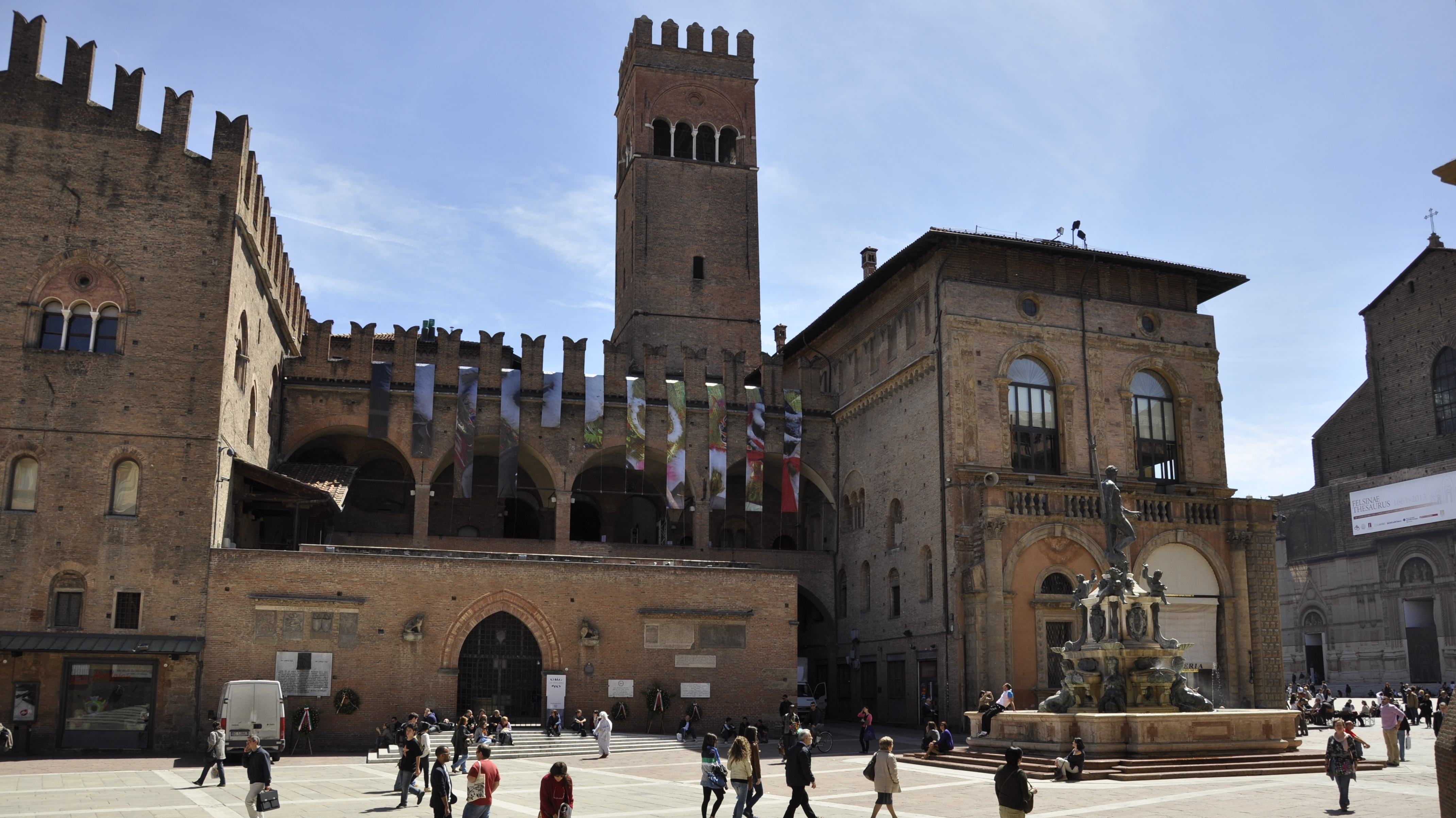 Palazzo Re Enzo aan Piazza del Nettuno in Bologna